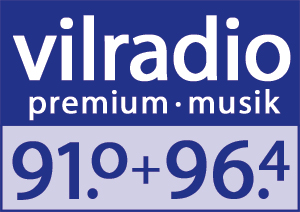 Senderlogo von Vil Radio in Nürnberg